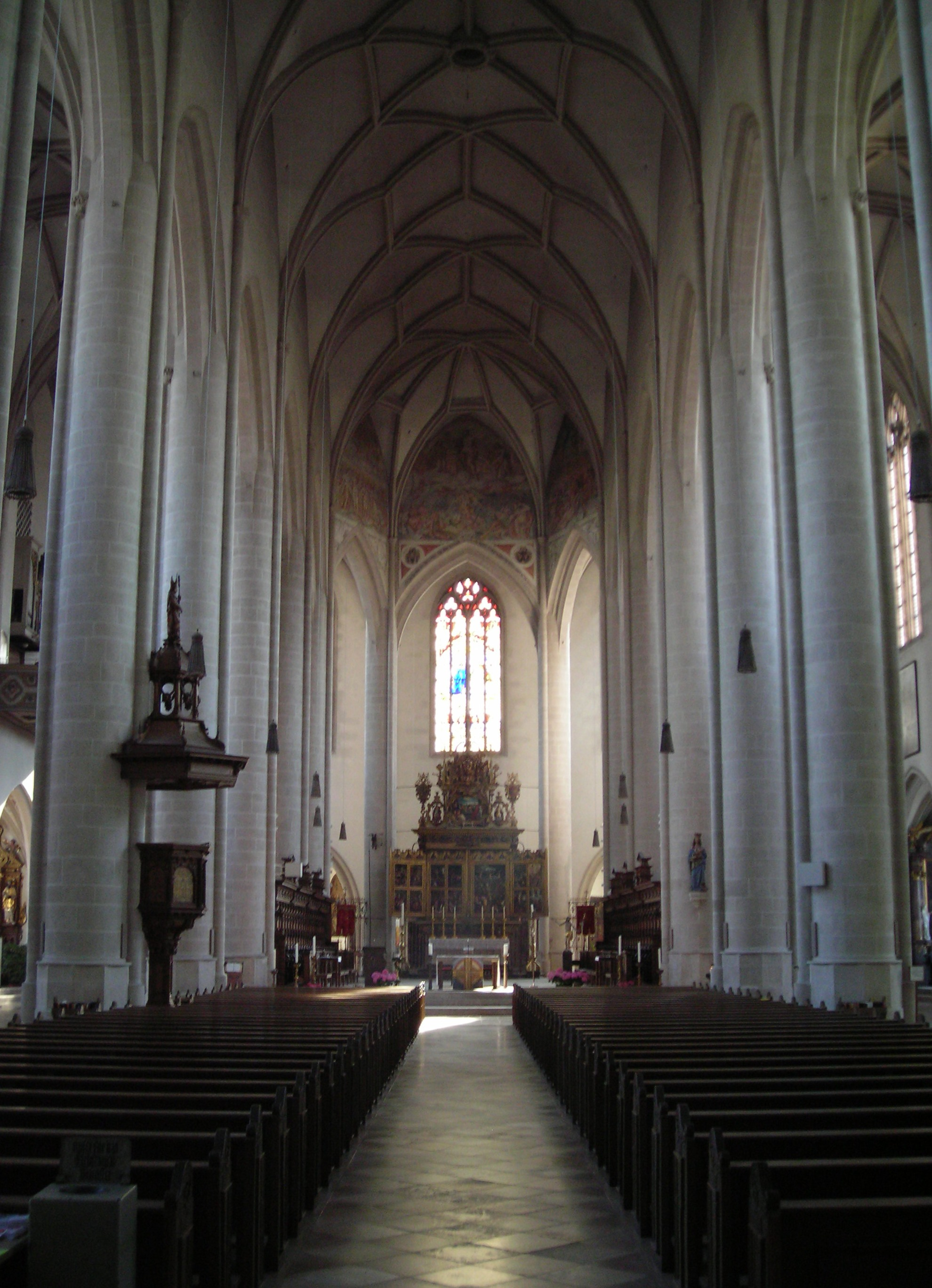 Münster Zur Schönen Unserer Lieben Frau in Ingolstadt - Blick zum Altar